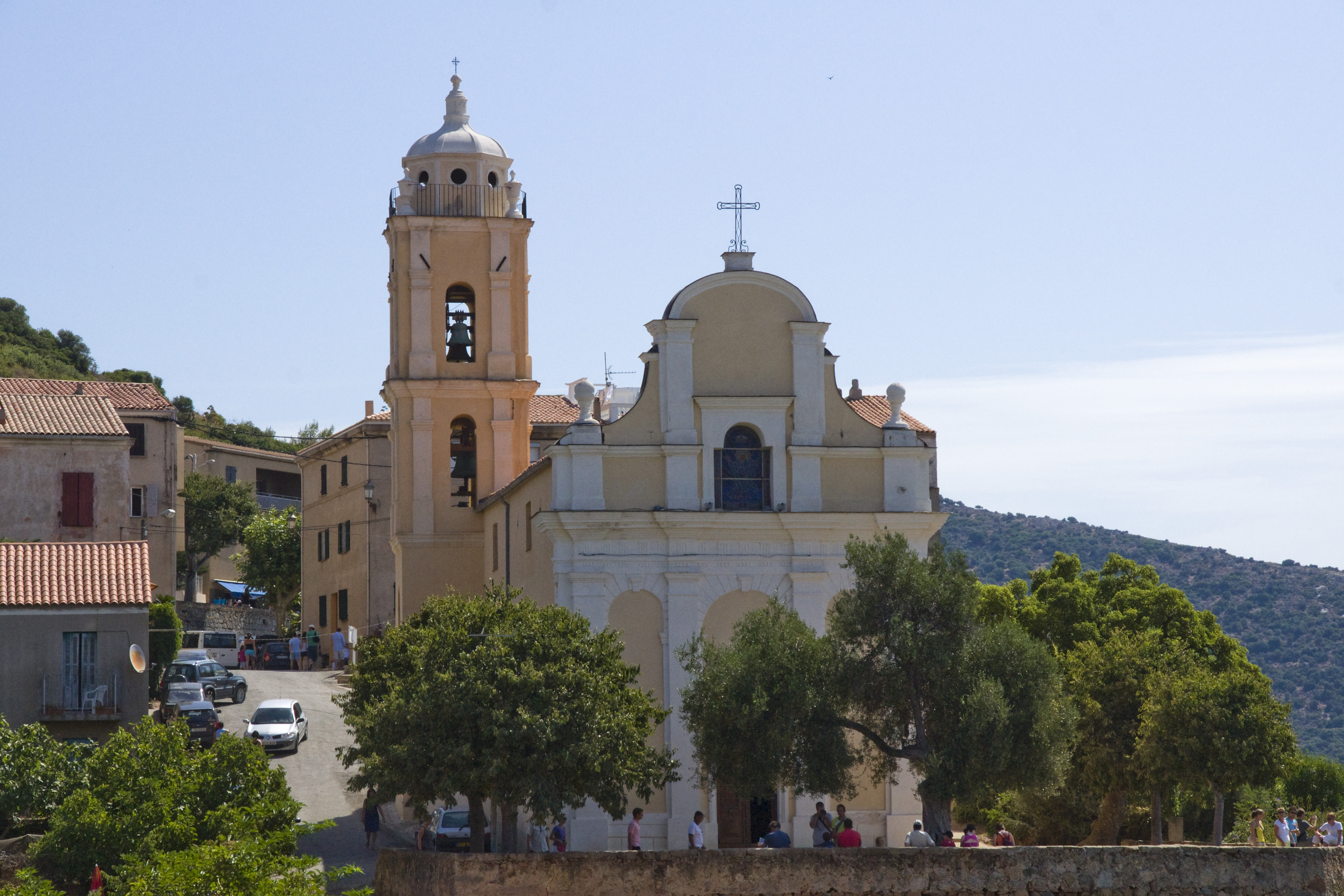 Corse - Cargèse - Eglise Latine